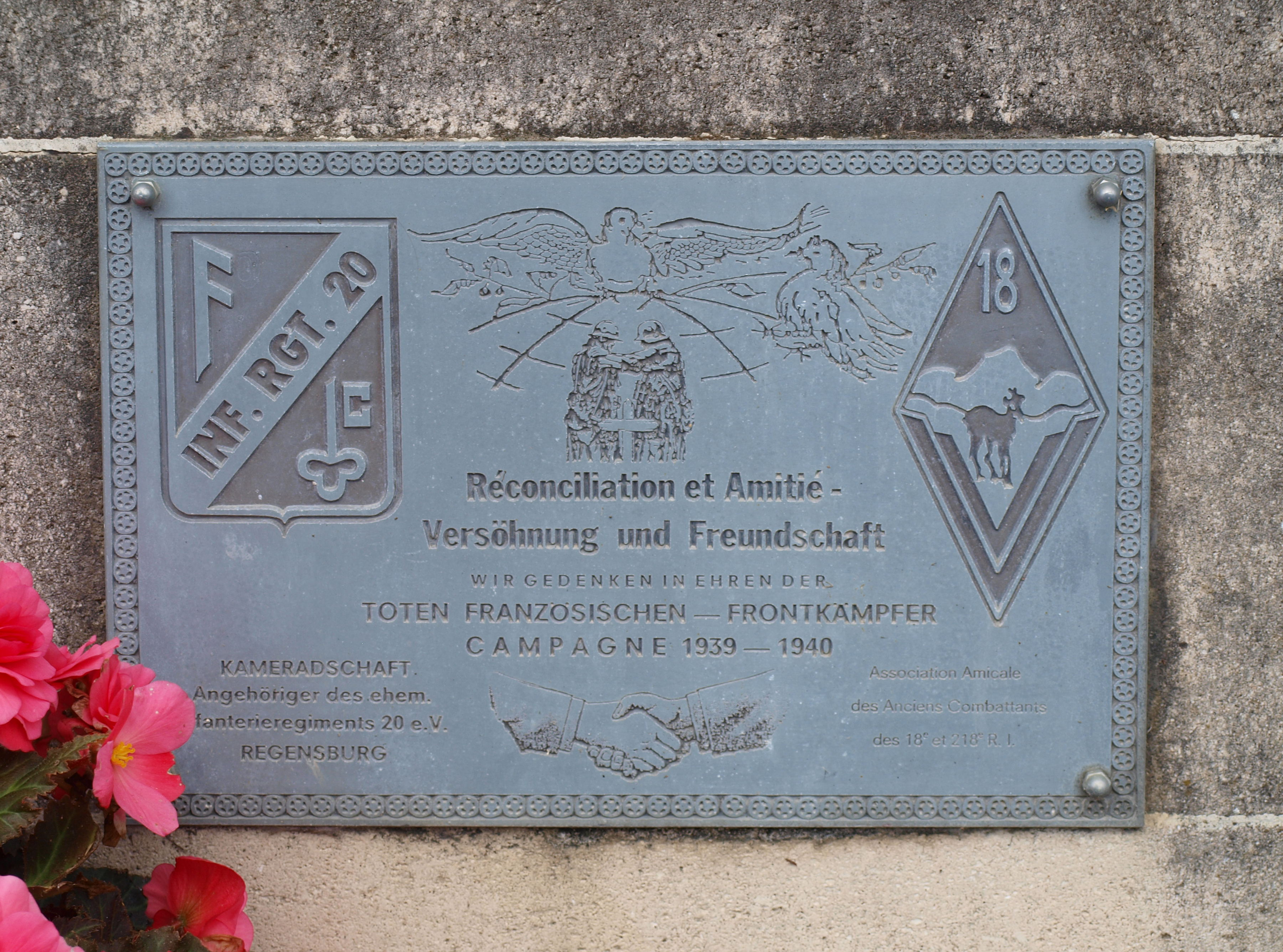 Attigny (Ardennes, France) ; mémorial 15e RI